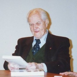 Jean Delannoy, cinéaste français.